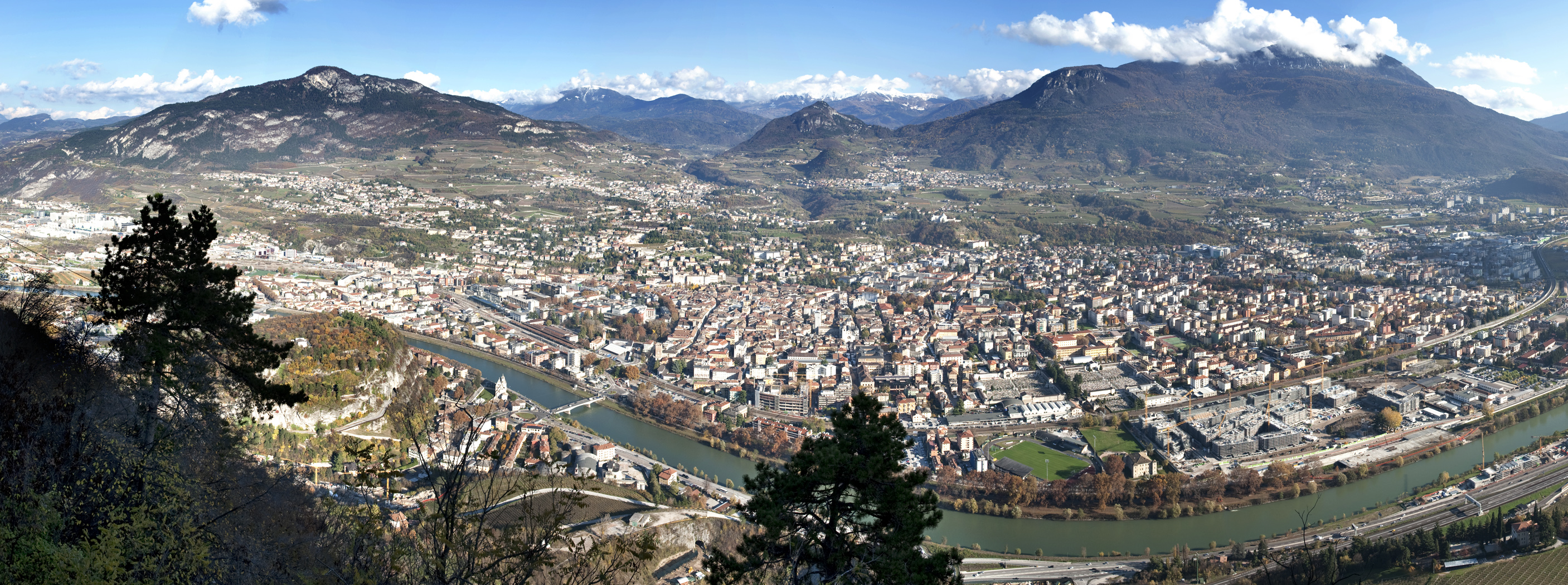 Panorama della città di Trento